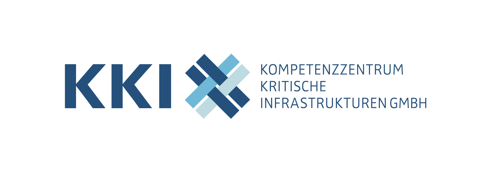 KKI GmbH Logo